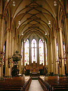 interieur Nicolaaskerk, IJsselstein